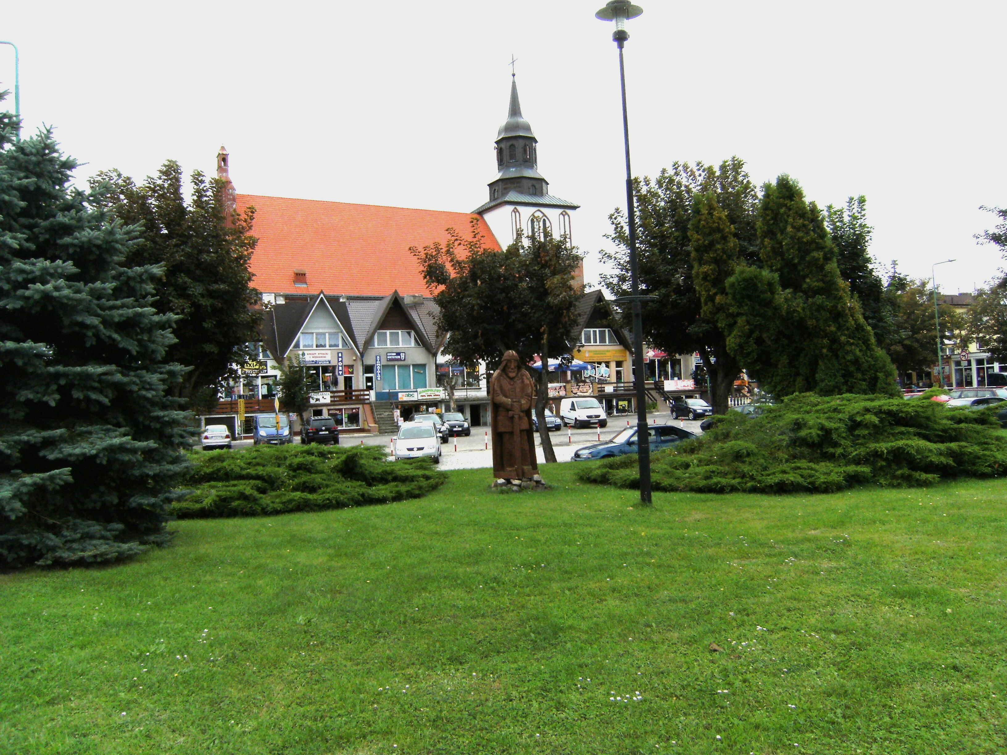 Blick auf Anlagen, Markt und Kirche von Wolin